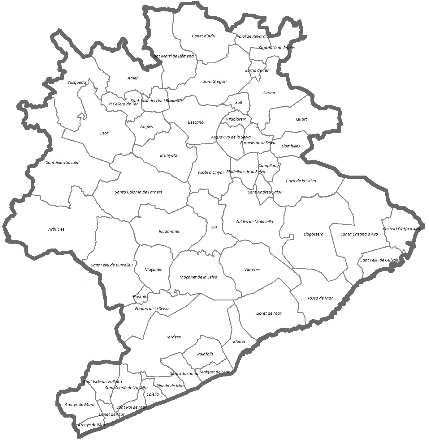 Mapa que inclou els municipis de la comarca natural de la Selva.